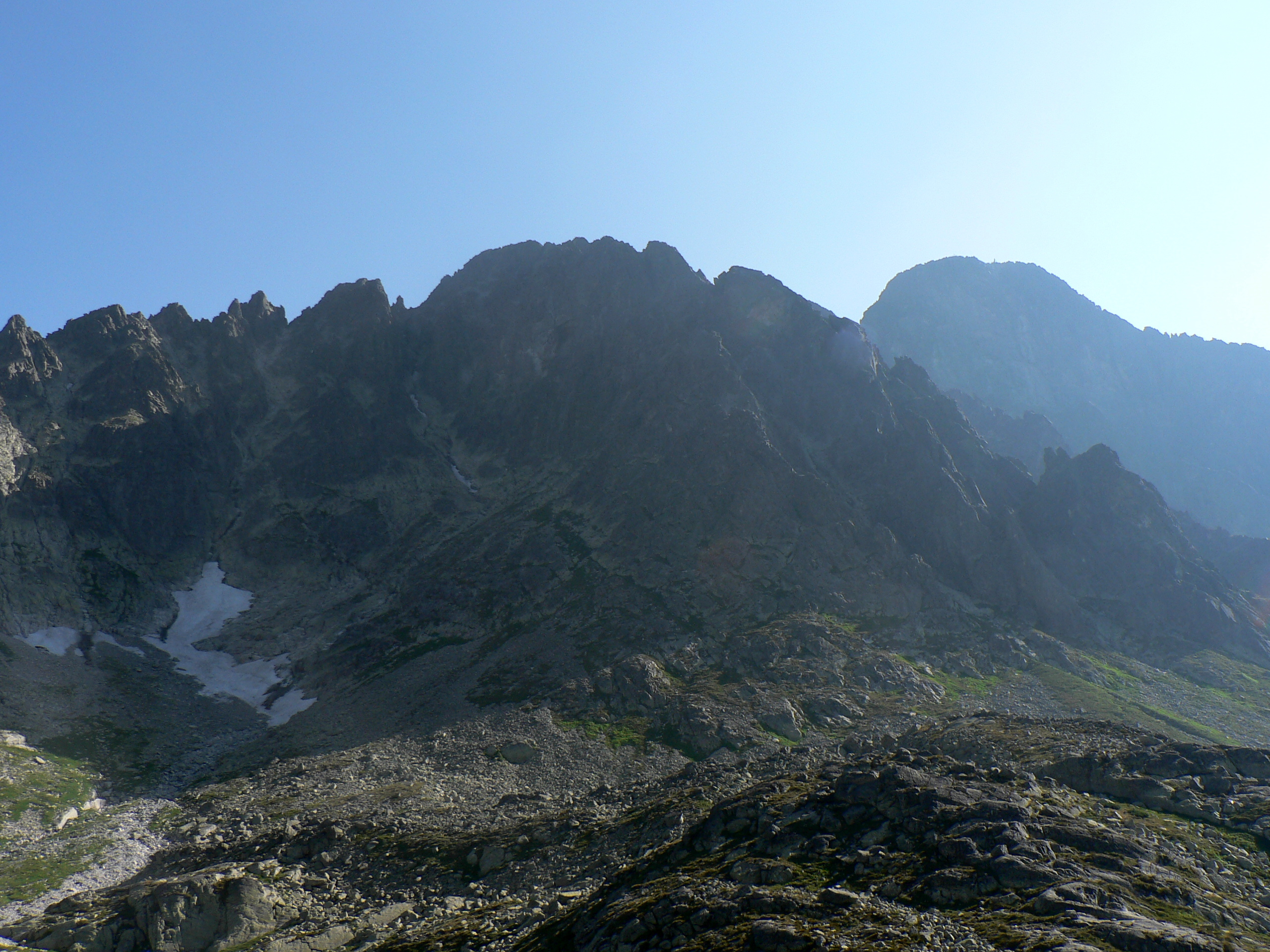 Durne Szczyty i Łomnica